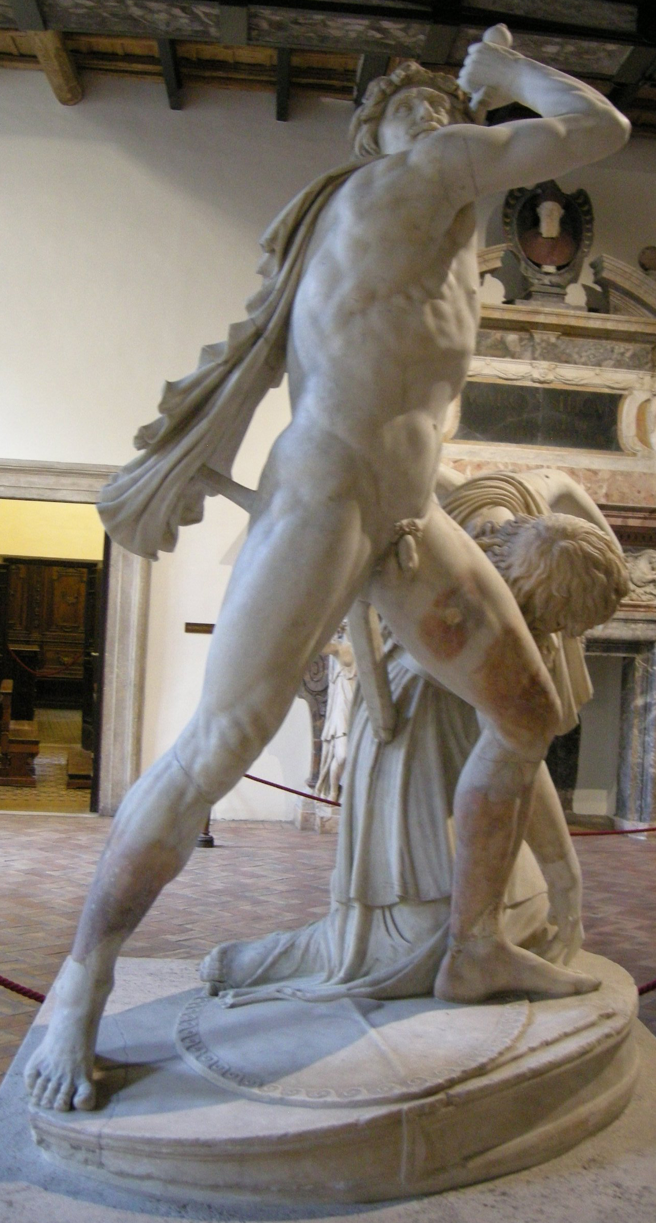 Ludovisi Gaul